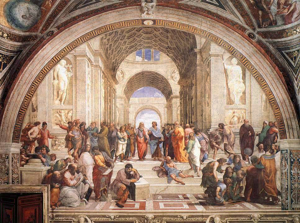 A Escola de Atenas, afresco no Vaticano